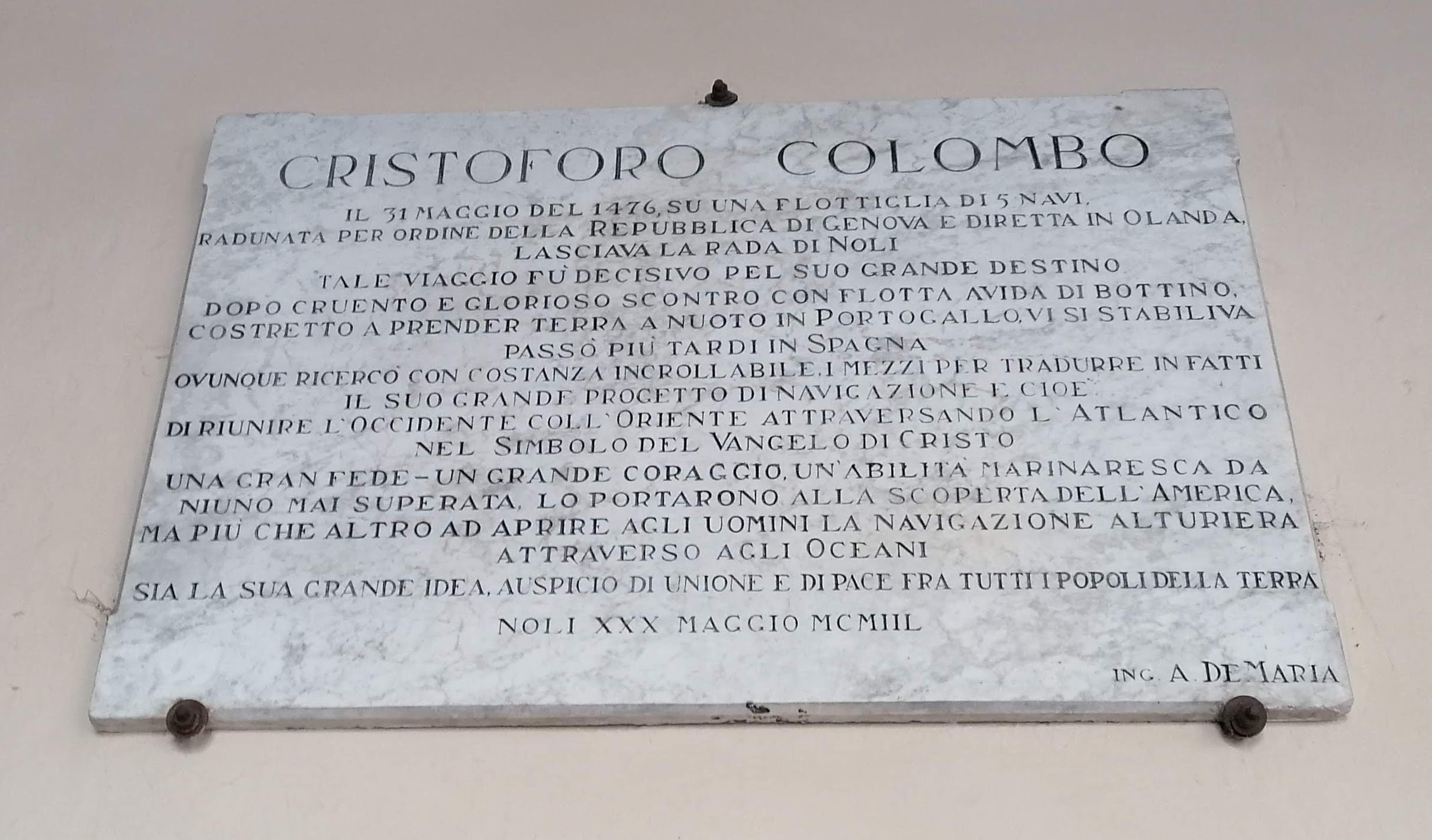 Targa commemorativa di Cristoforo Colombo nella Loggia della Repubblica Nolese.